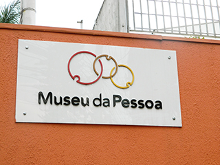 Foto da fachada do Museu da Pessoa, em São Paulo, no bairro Vila Madalena.